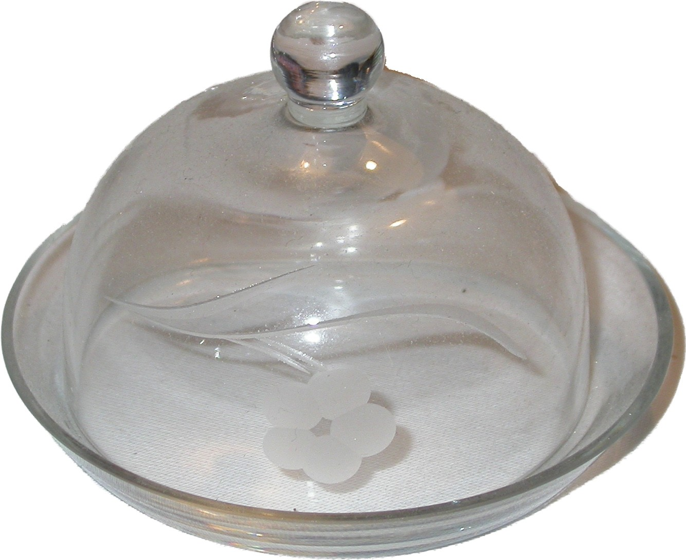 eine Käseglocke, leer